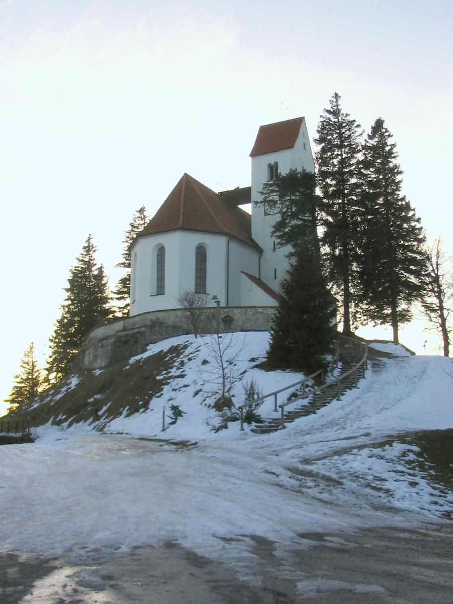 Kirche St. Georg auf dem Auerberg